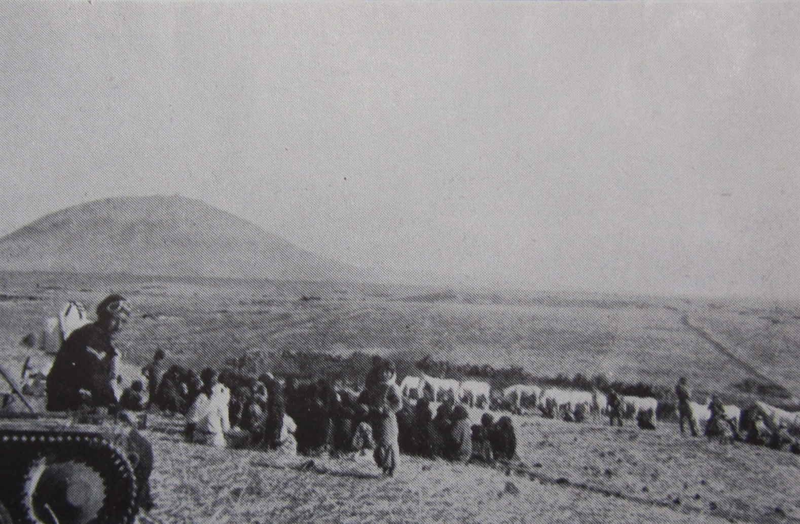 חיילים בריטיים (אחד ישוב על טנק ויקרס סימן III) ותושבים ערבים על רקע הר התבור, במהלך פעילות מבצעית לדיכוי המרד הערבי הגדול, נובמבר 1936.